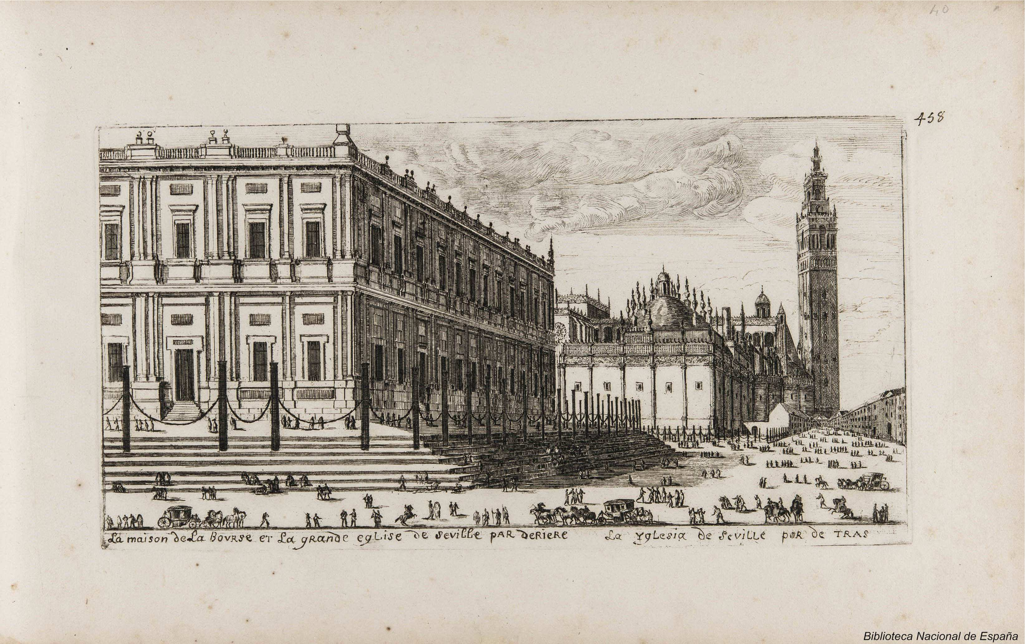 Louis Meunier: La Casa de Contratación y la catedral de Sevilla vista por detrás. Aguafuerte, buril y punta seca perteneciente a la serie de vistas de España dibujadas del natural y grabadas por Louis Meunier entre 1665 y 1668. Biblioteca Nacional de España.